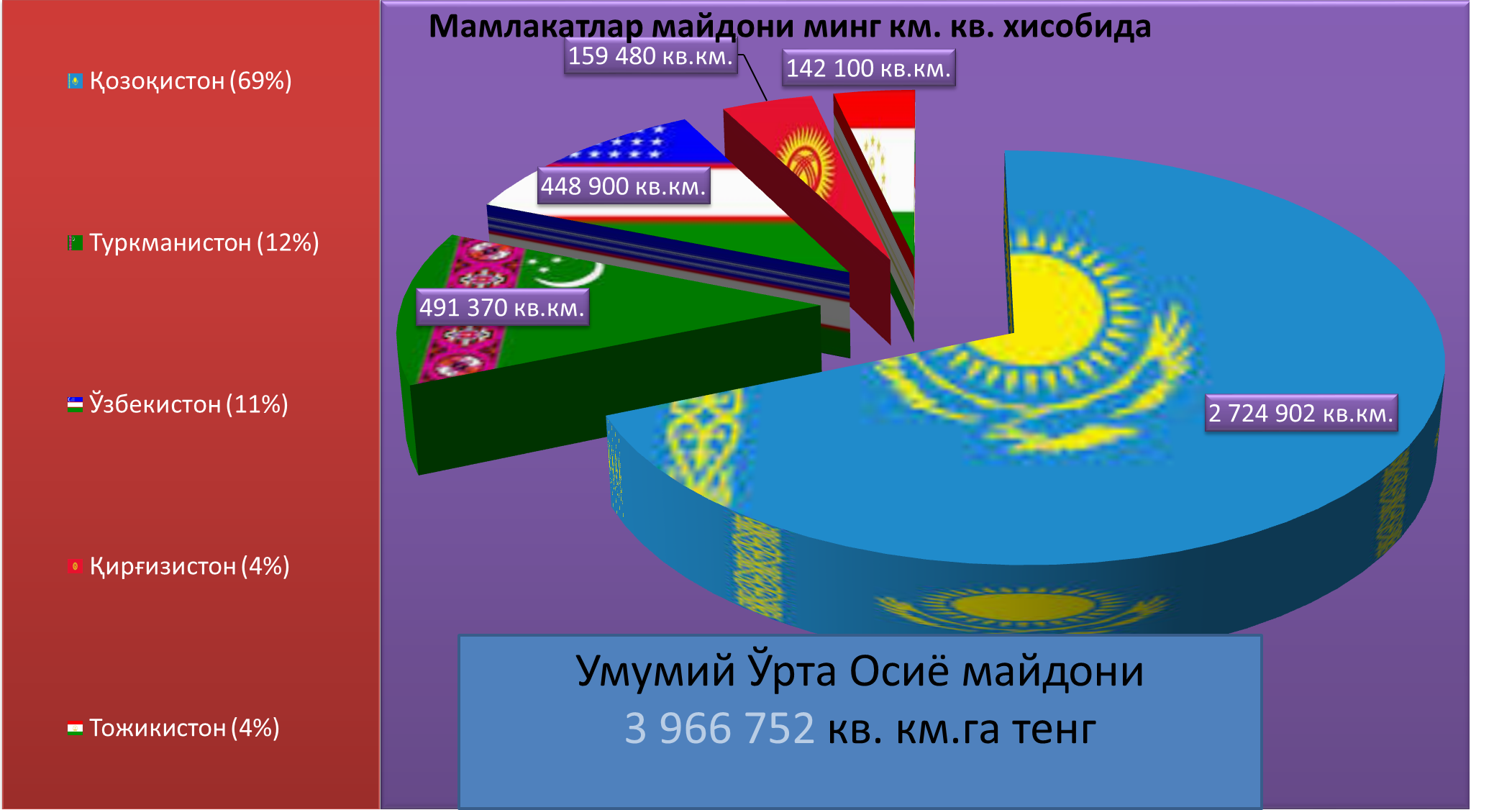 Oʻzbekcha/ўзбекча: Умумий Ўрта Осиё майдони